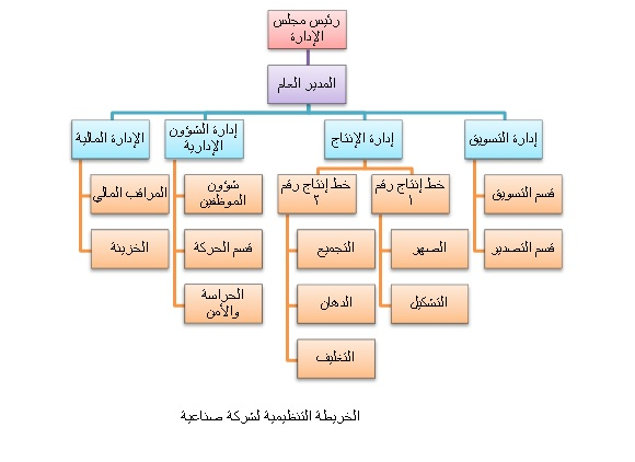 خريطة تنظيمية لشركة صناعية